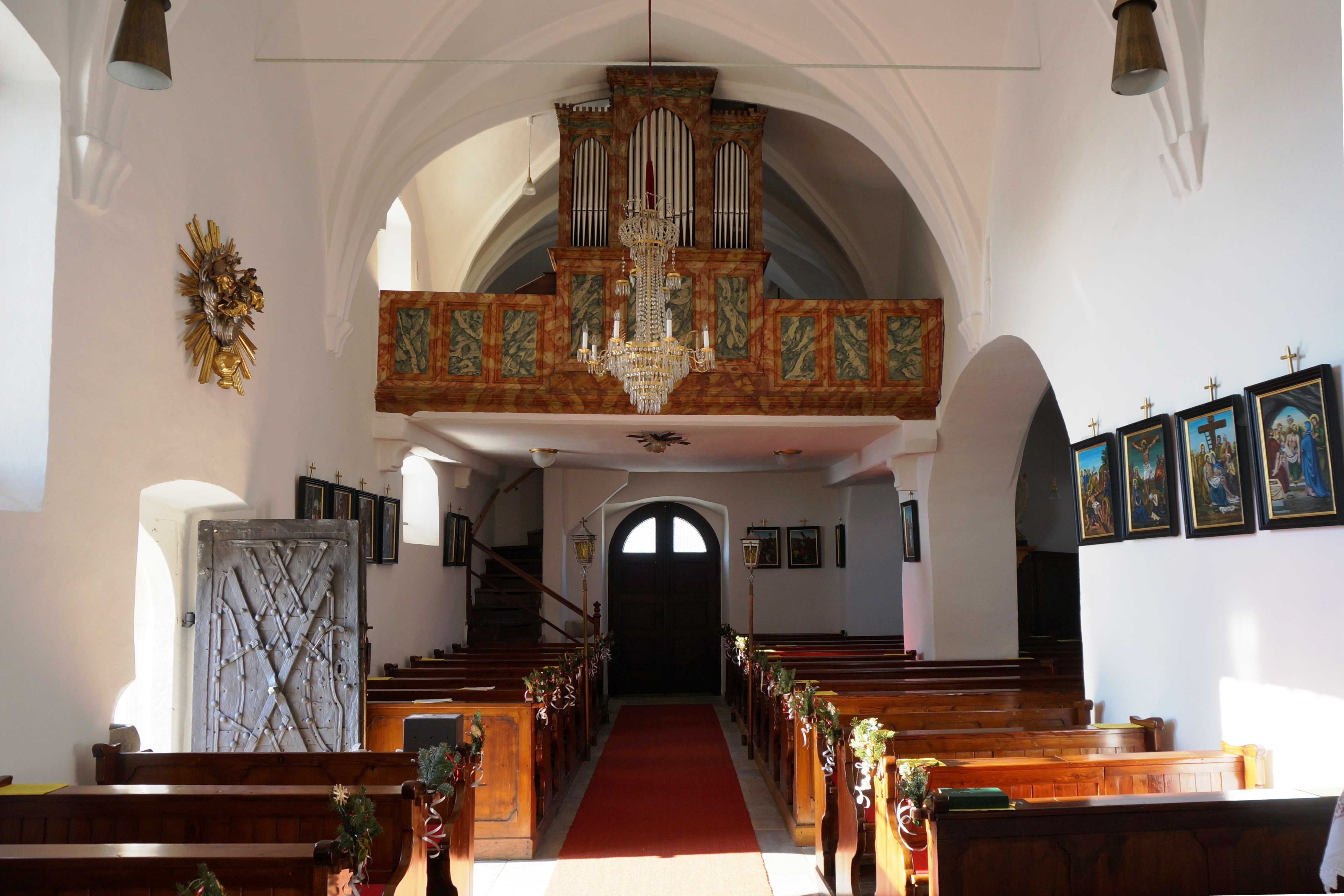 Kath. Pfarrkirche hl. Martin und Friedhof. Das Romanische Langhaus mit einem gotischen Chor stammt aus dem 14. Jhd.